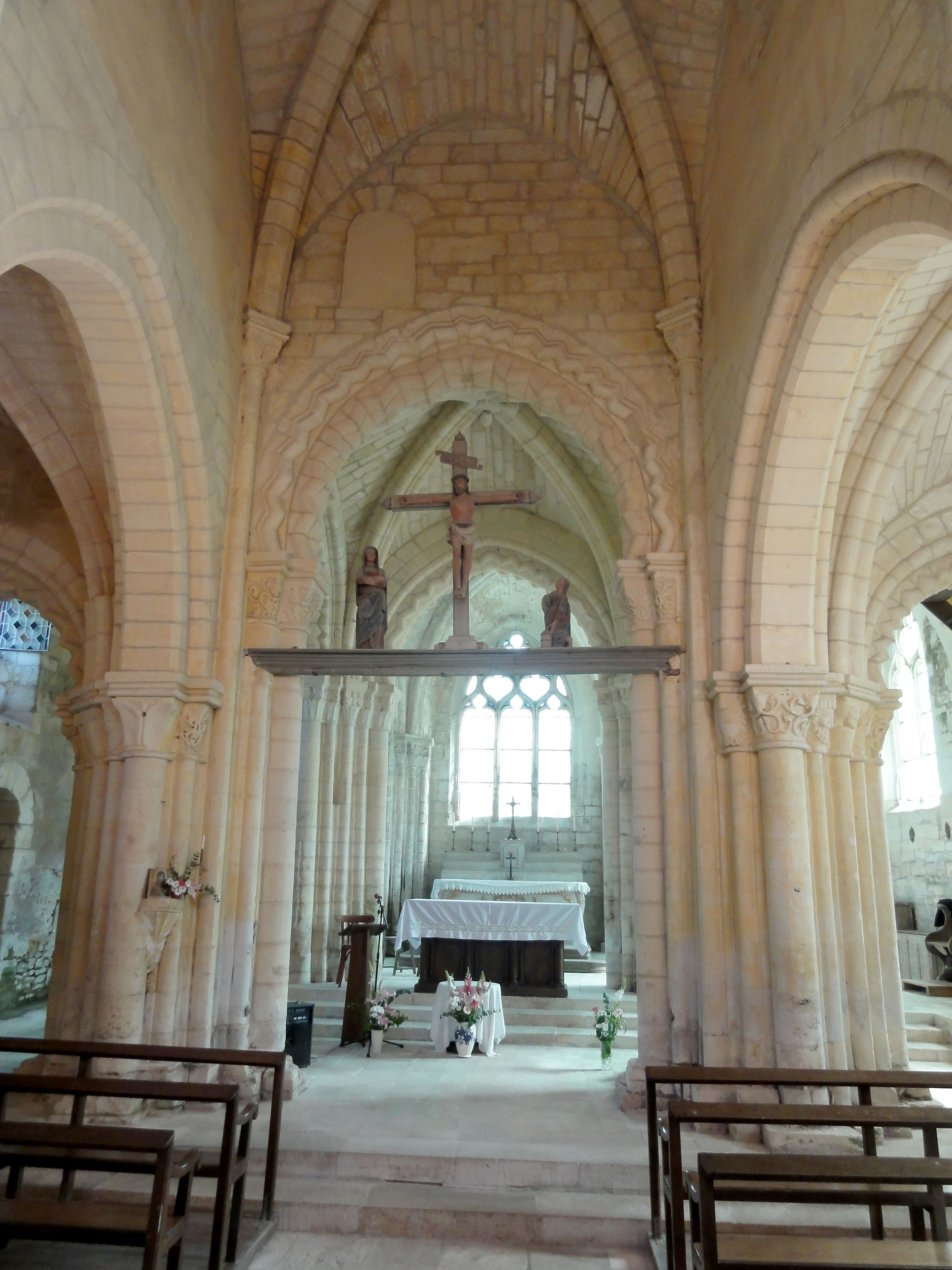 Nef, vue vers l'est.